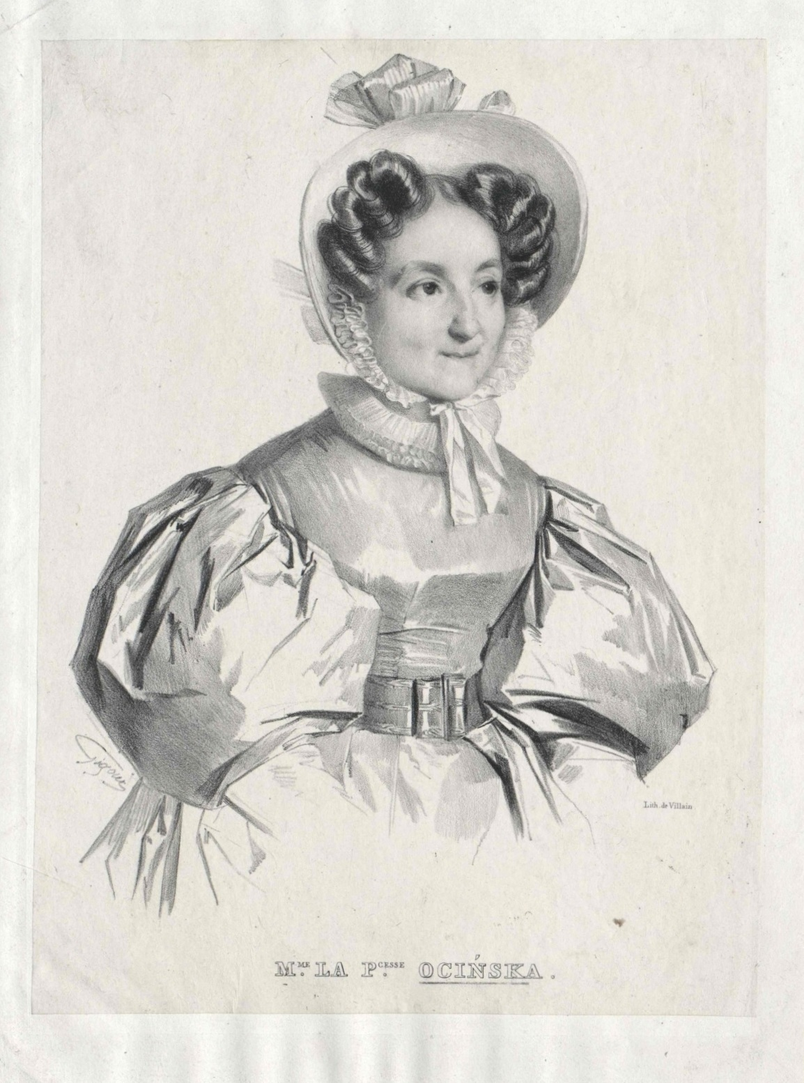 Kunegunda z Platerów Ogińska